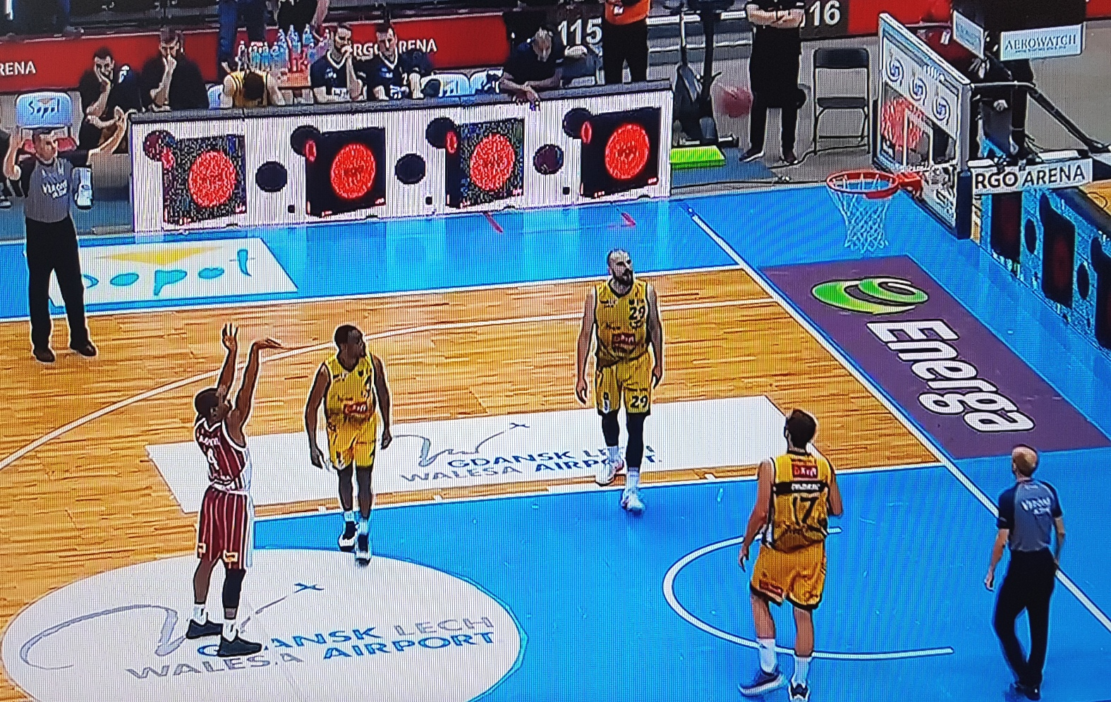 Spójnia wygrywa w Sopocie